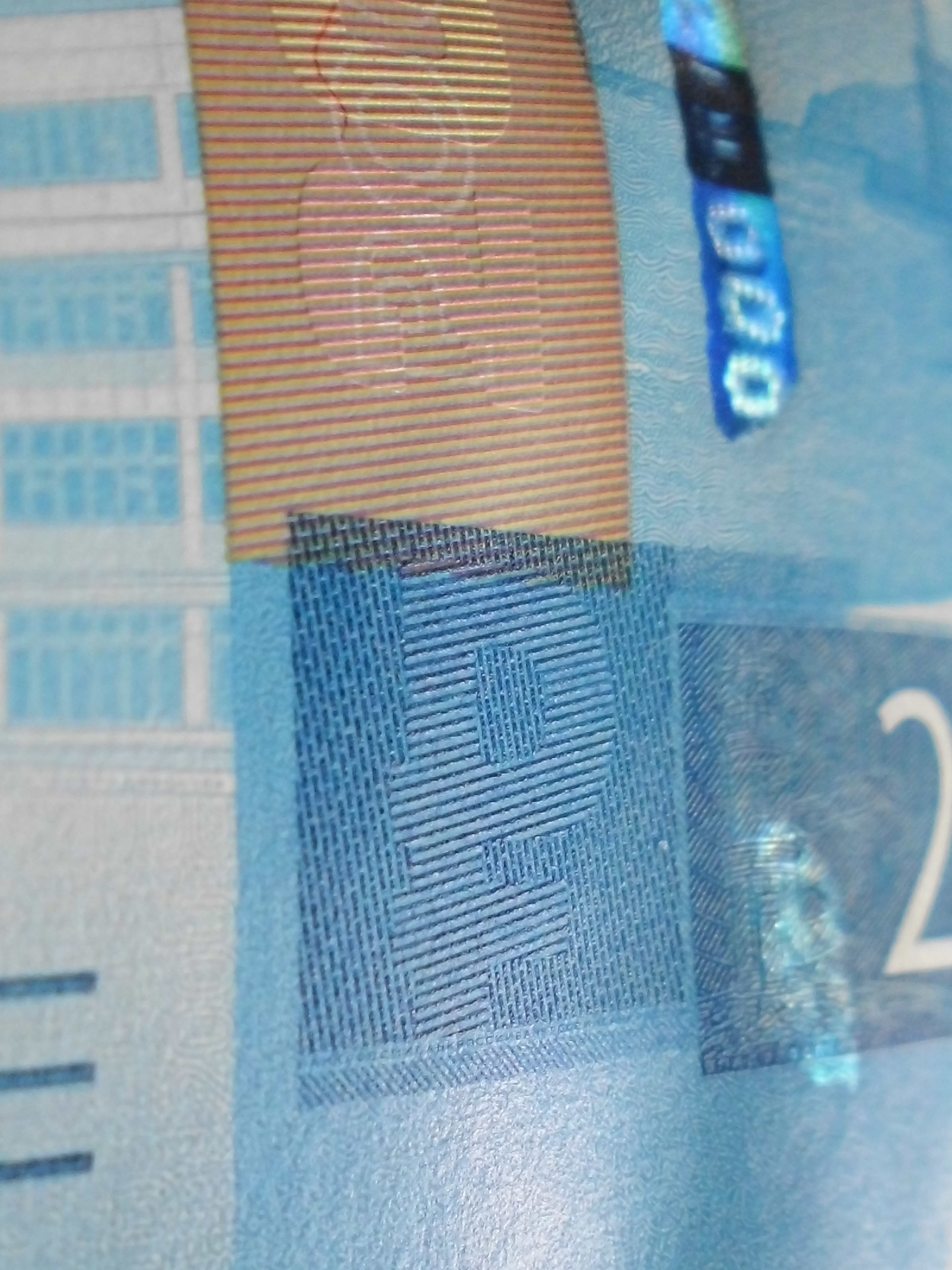 2000 российских рублей образца 2017 года. Аверс. Символ рубля с КИПП-эффектом. Вид под острым углом с левой стороны банкноты.